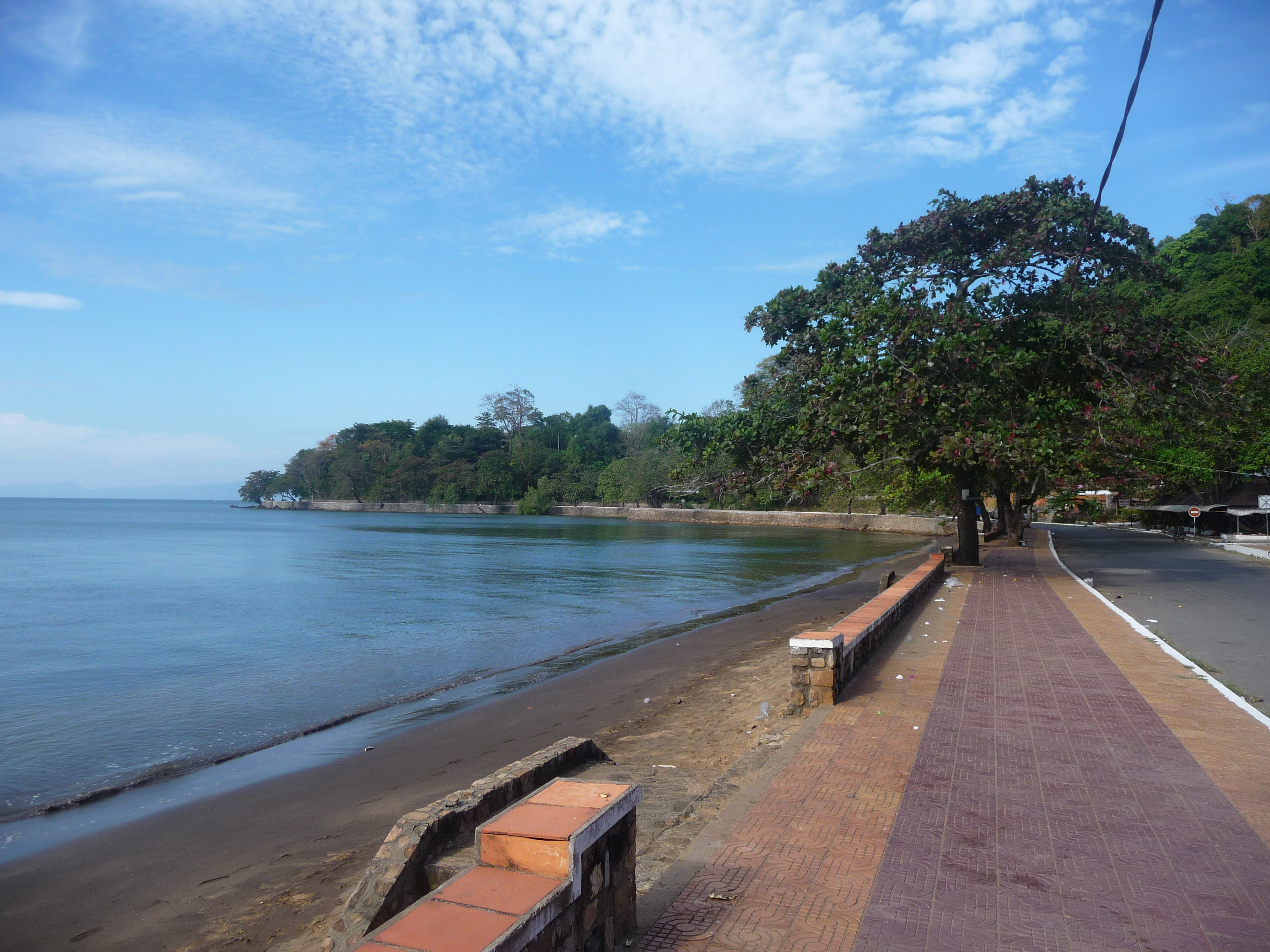 Promenade avec petite plage de sable noir